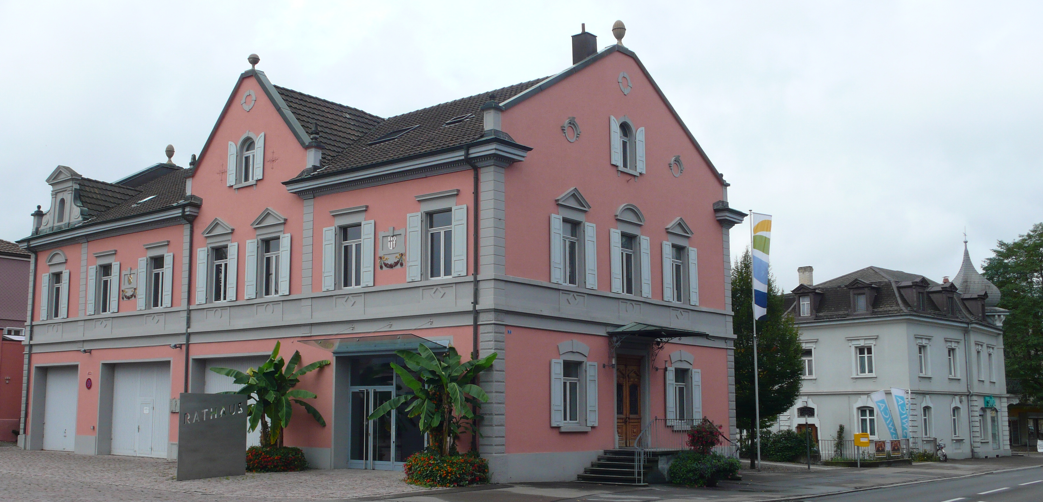 Löwenstrasse Kreuzlinger Rathaus an der Löwenstrasse